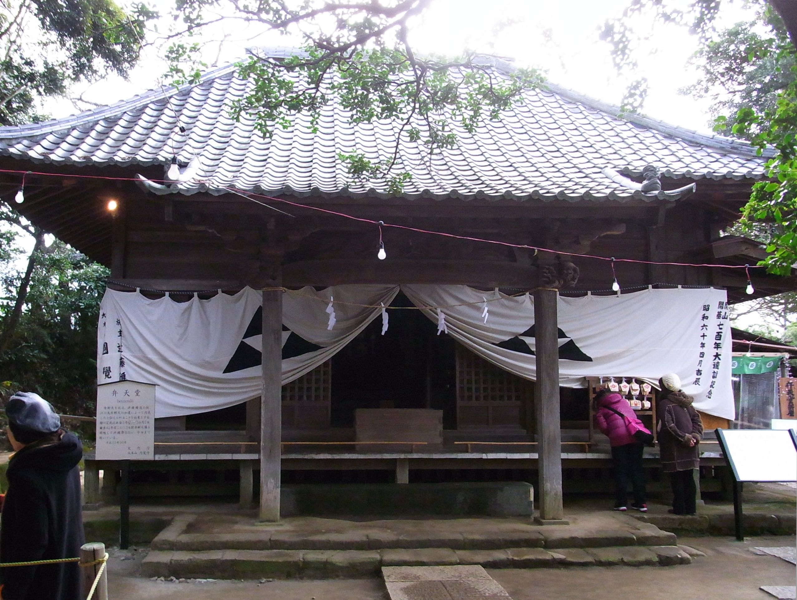 円覚寺弁天堂